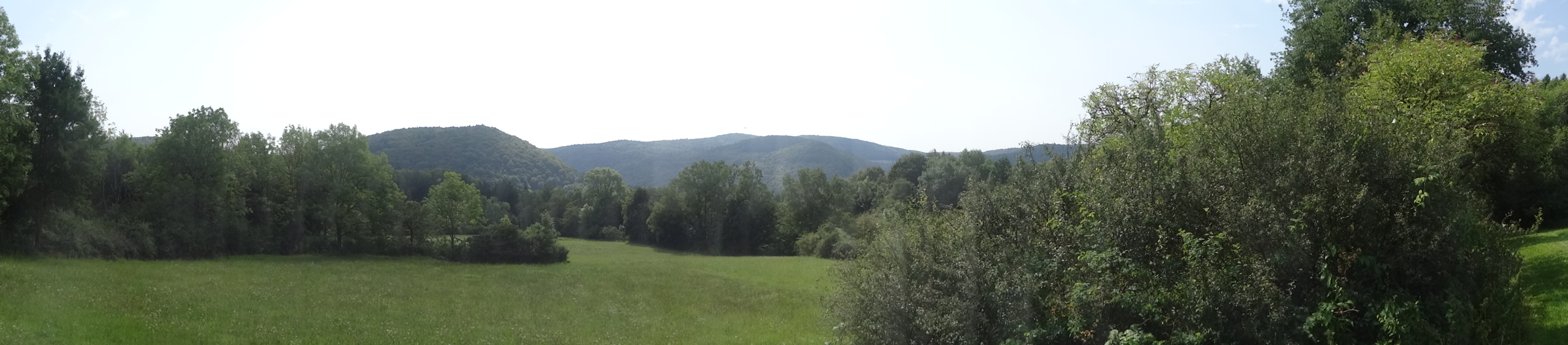 Landschaftsaufnahme